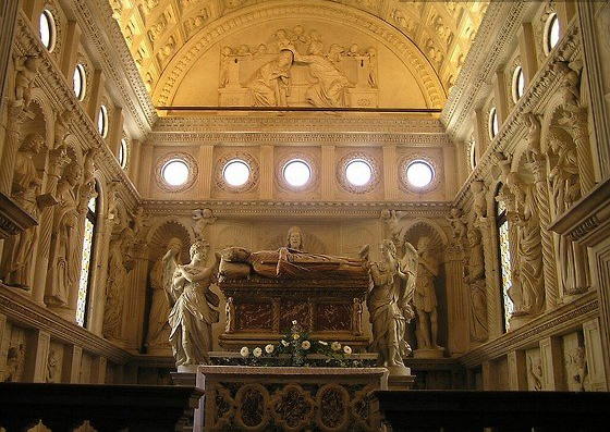 Foto personale del 2008 Licensing Categoria:Traù